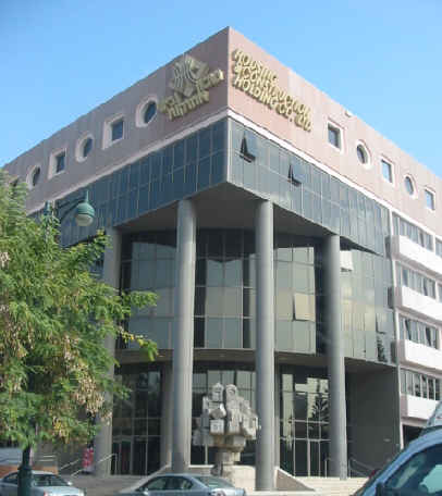 Shikun U'Binui HQ in Ramat Gan